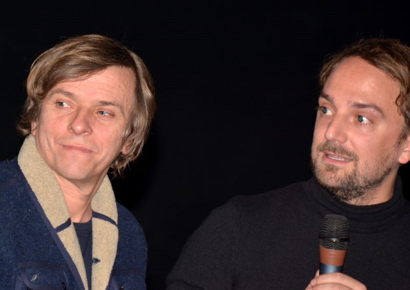 L'acteur Pascal Demolon et le réalisateur Louis-Julien Petit à l'avant-première du film "Discount"